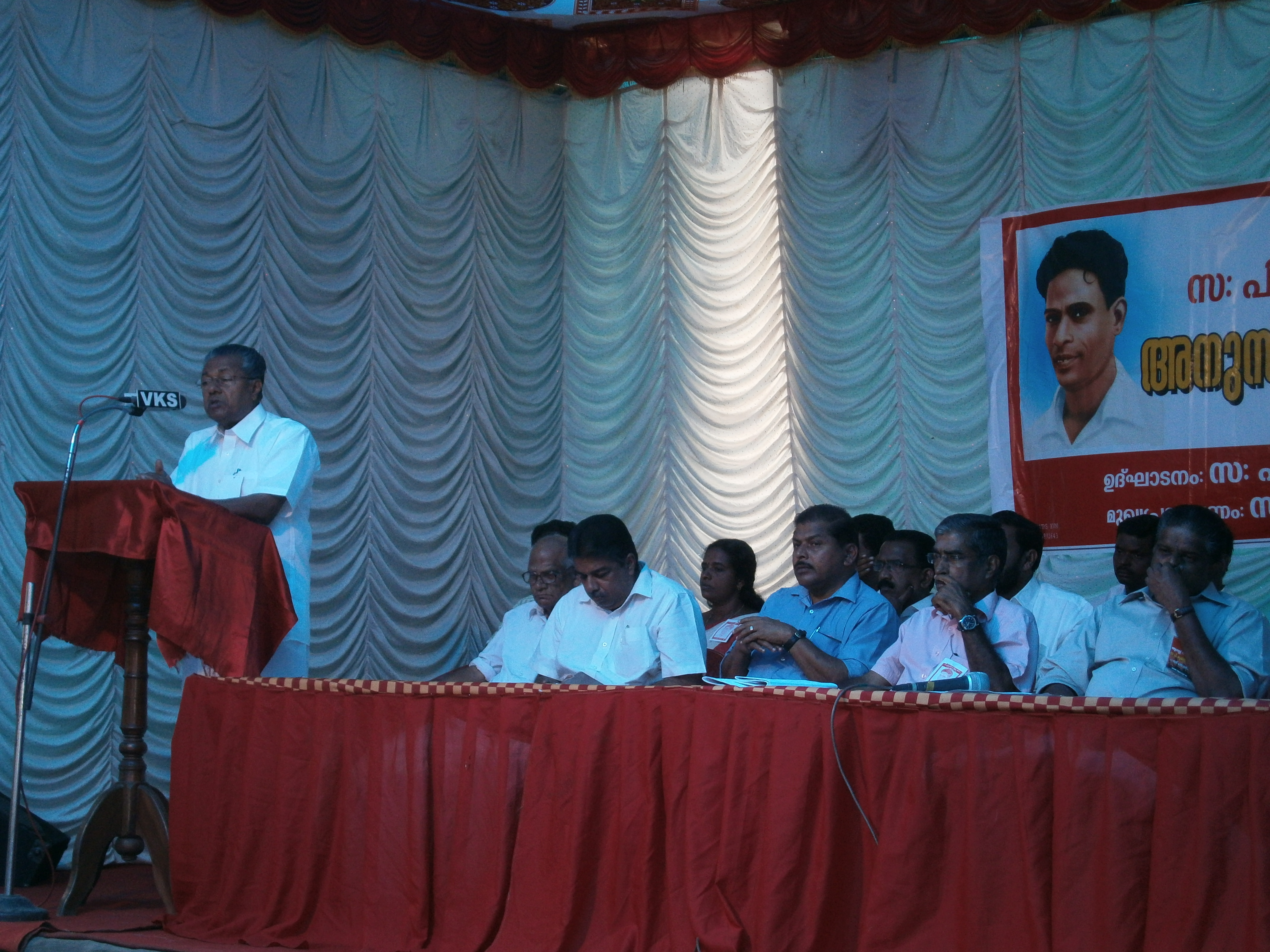 പി. കൃഷ്ണപിള്ള അനുസ്മരണ പ്രഭാഷണം - പിണറായി വിജയന്‍